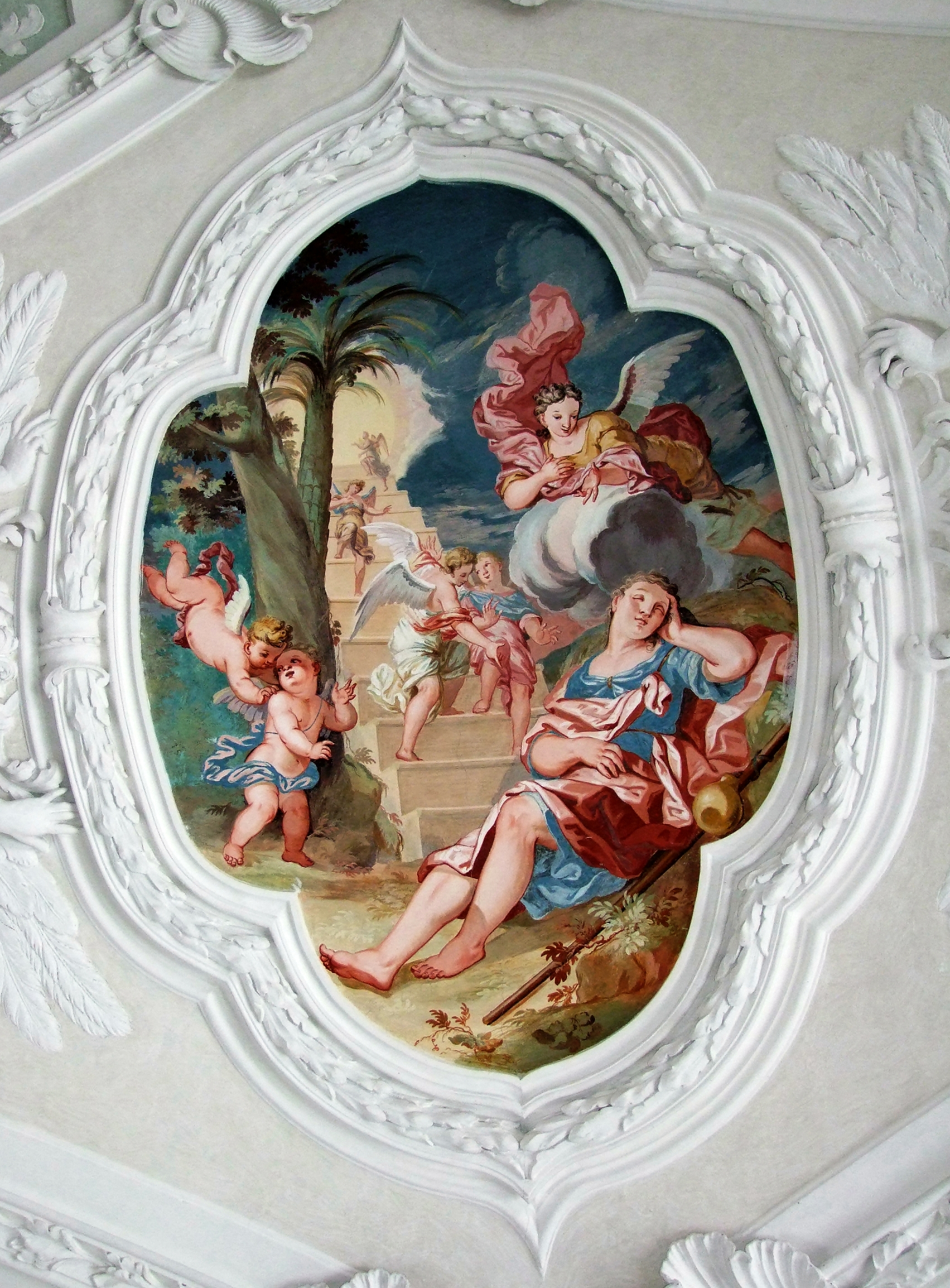 St. Maria im oberschwäbischen Buxheim bei Memmingen.